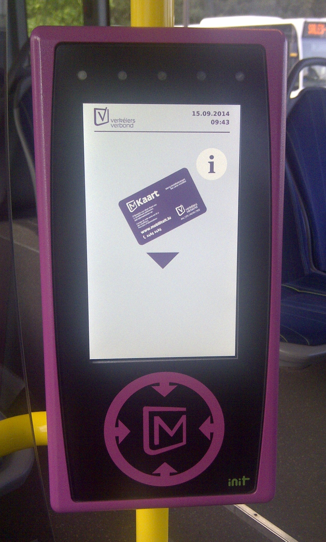 Eng Borne fir déi elektronesch Ticketen mKaart ze validéieren.